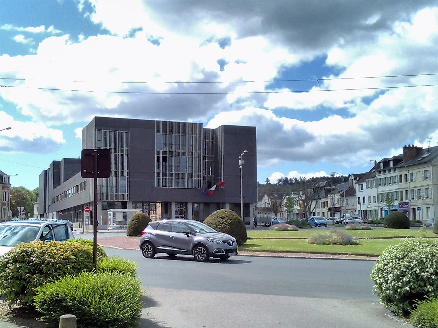 Siège de la communauté d'agglomération à Louviers (27).